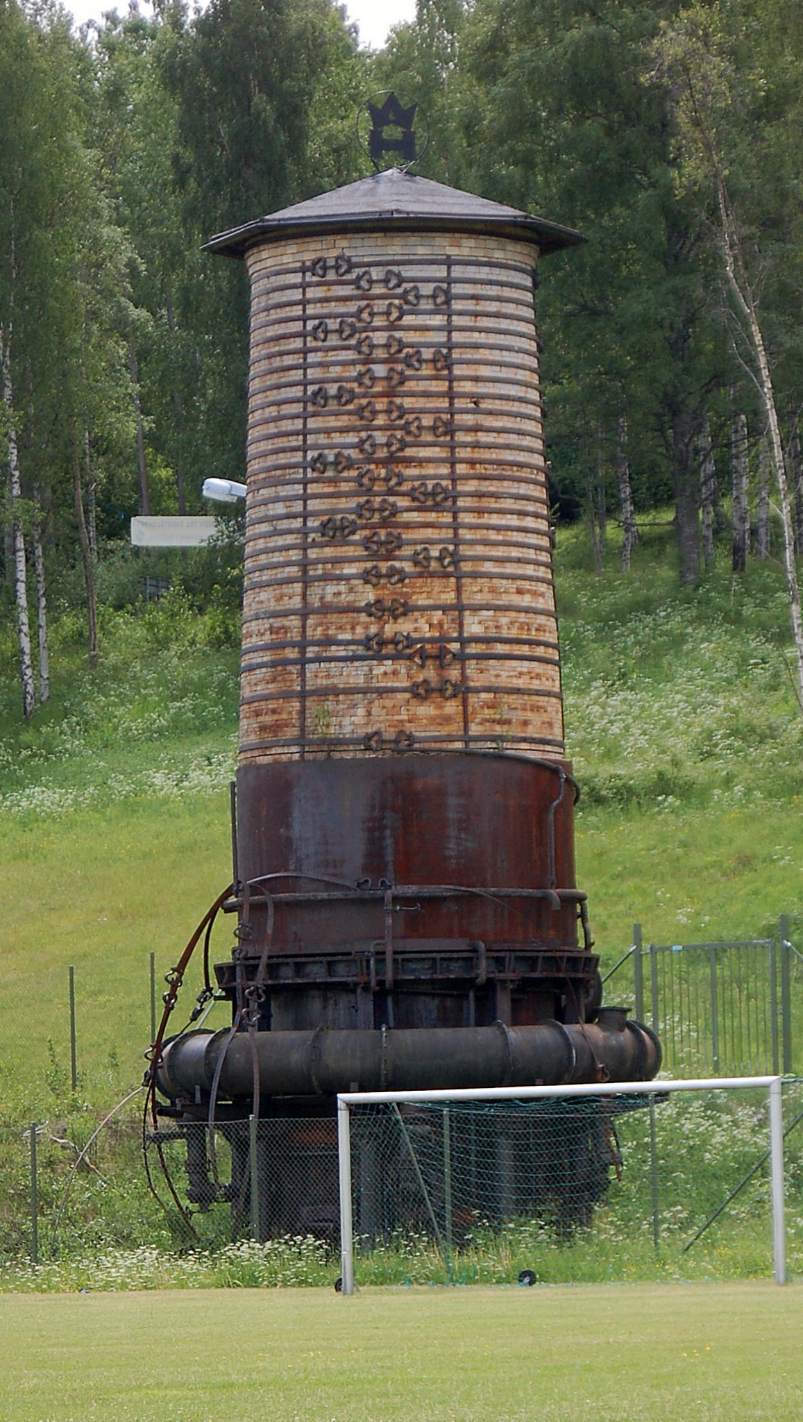 Masugnen vid Svartå Bruk, Sverige